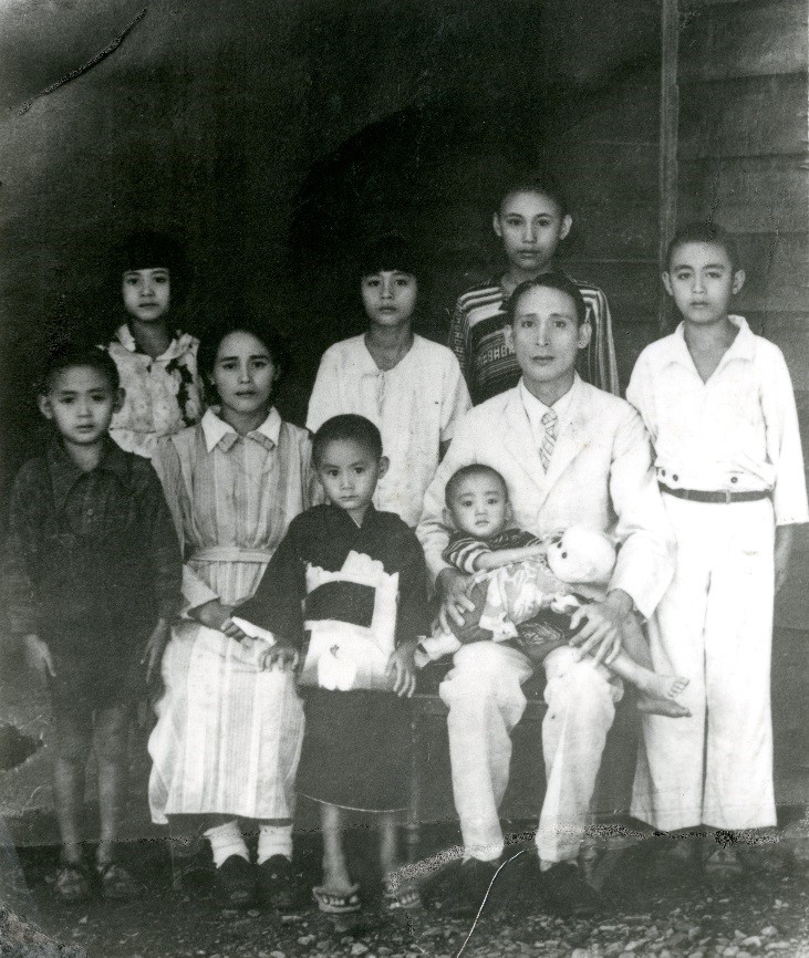 1908-1954, 遭中國黨殺害 killed by Chinese regime